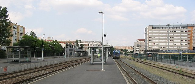 Toulouse-Saint-Cyprien-Arènes train station in Toulouse, Haute-Garonne, France.